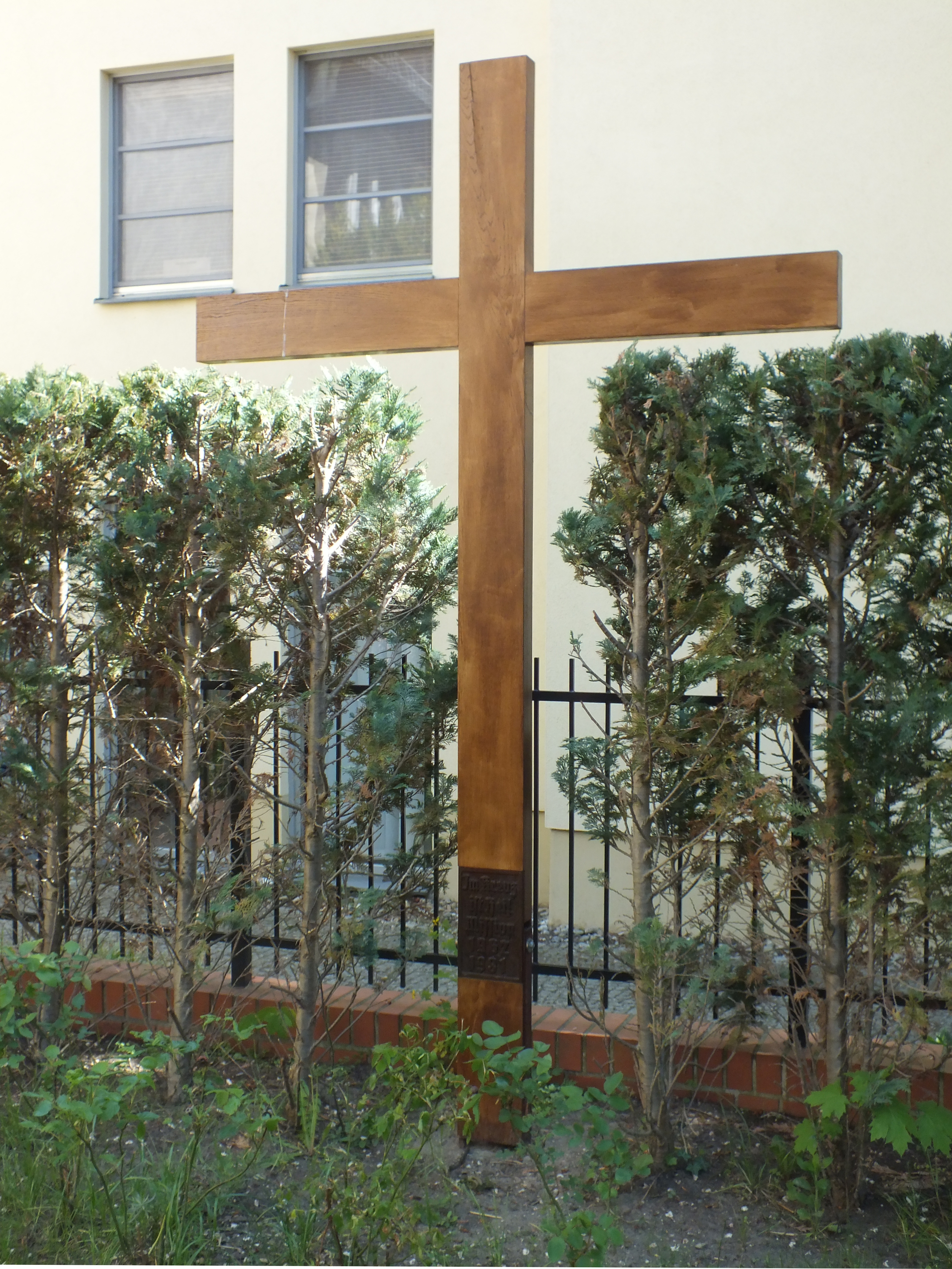 Berlin-Friedrichshagen: katholische Kapelle St. Franziskus, Ansicht von Nordwest